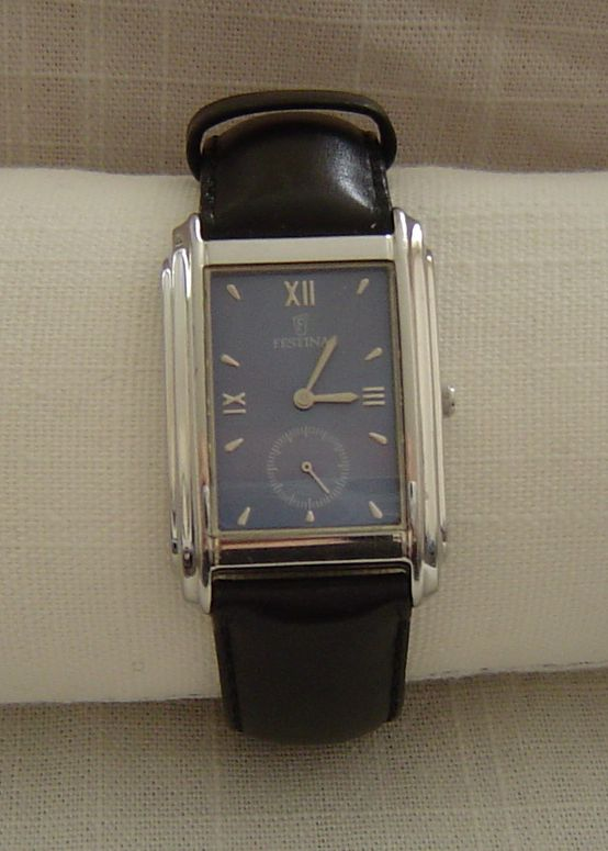 Montre Festina